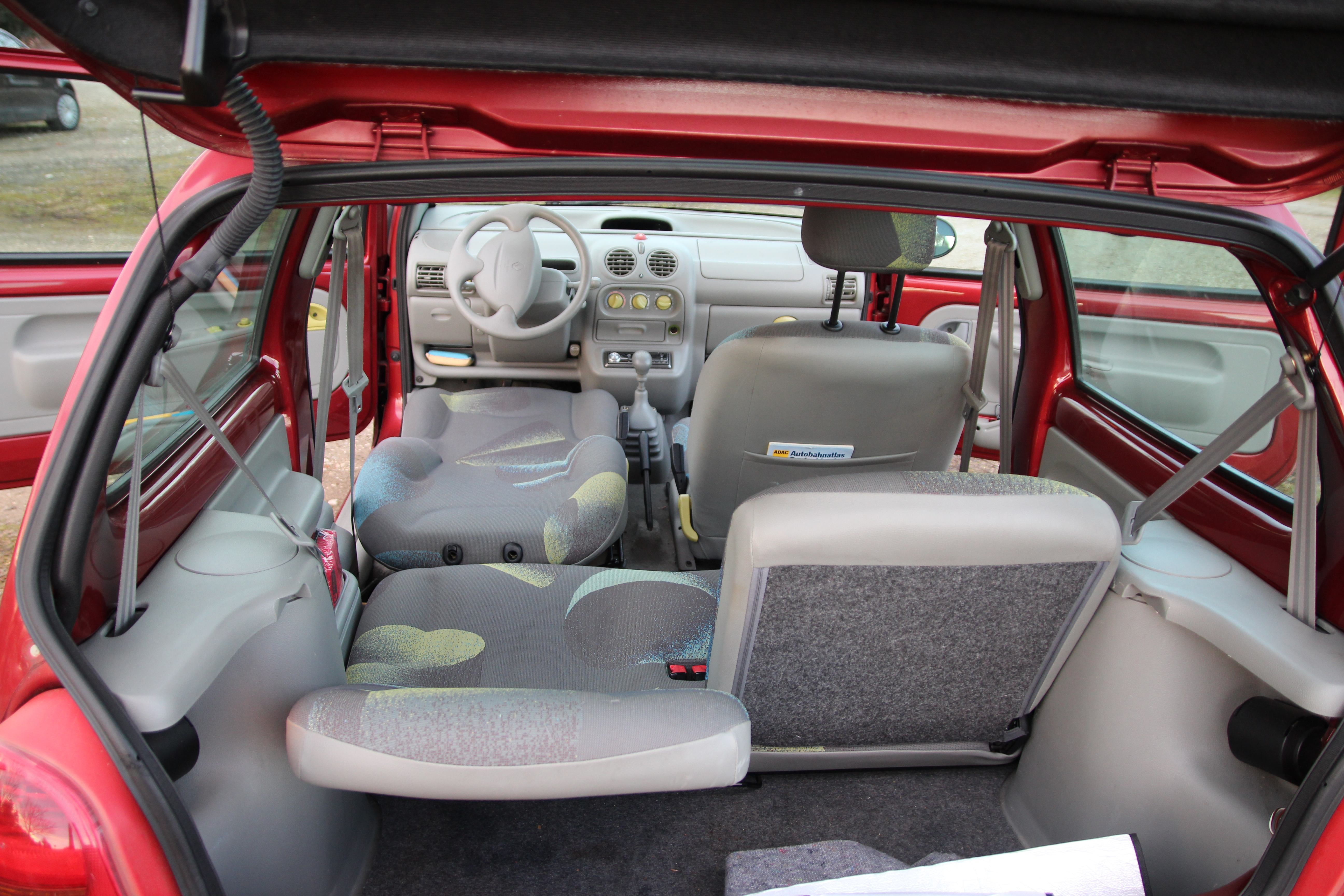 Fahrer- und Beifahrerseite lassen sich unabhängig voneinander zur Liegefläche umklappen.